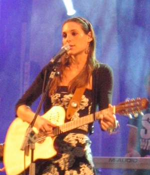 Actuación de Conchita en Cantillana (Sevilla)